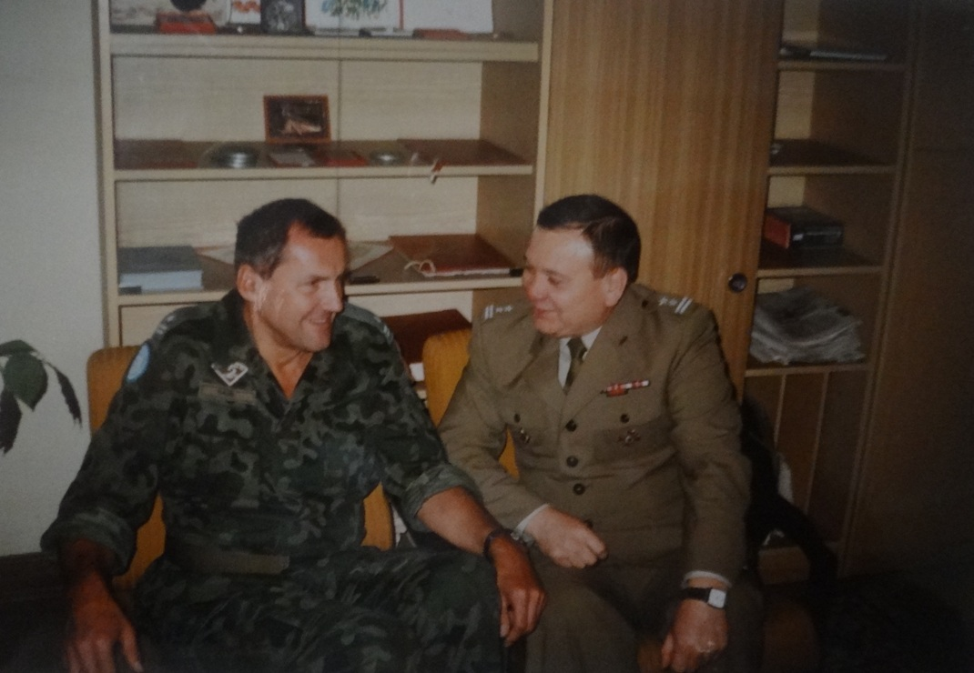 Dowódca 45 Batalionu Medycznego ppłk lek. Antoni Kalinowski z lekarzem Leszkiem Hausem